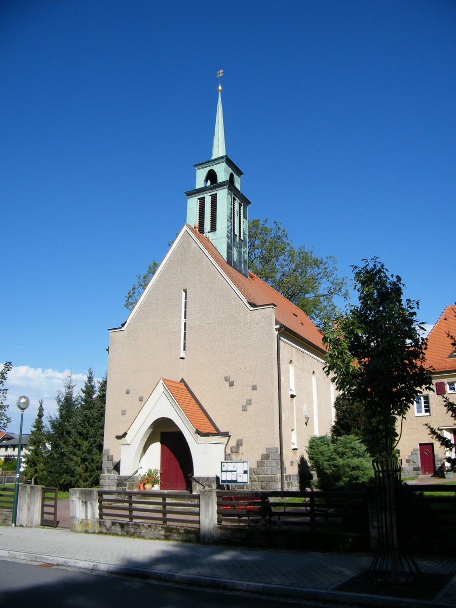 Katholische Pfarrkirche St. Gertrud, Neustadt in Sachsen